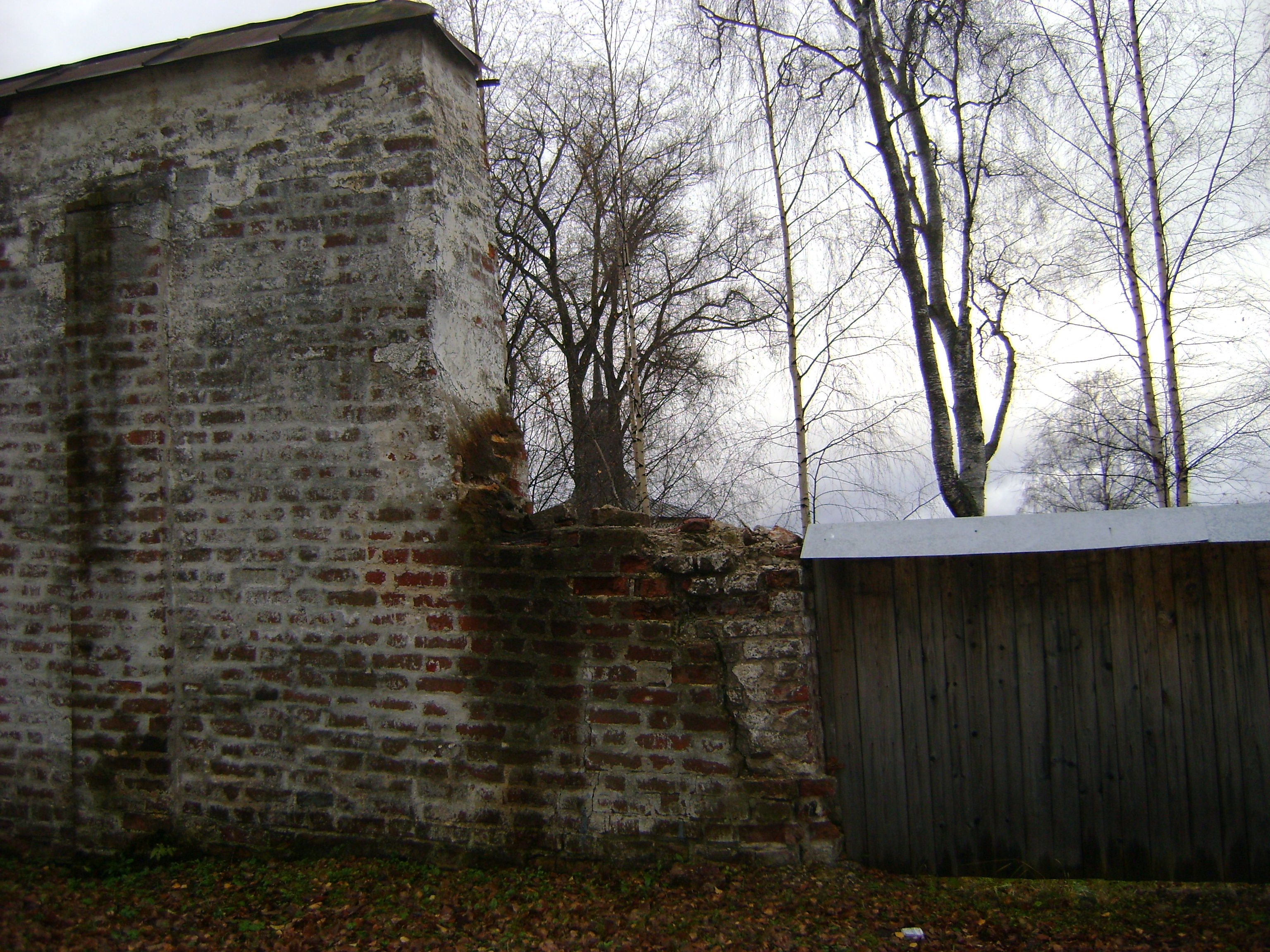 Конец восточной стены Малого Ивановского монастыря